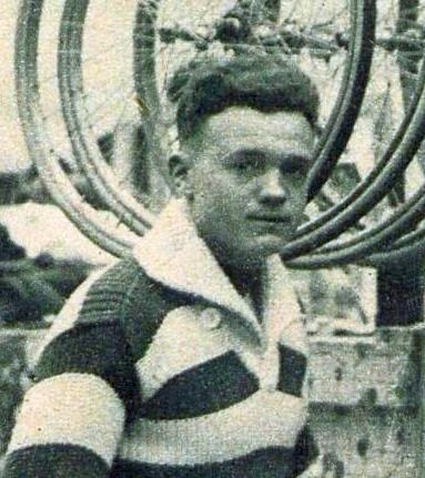 Octave Dayen en 1936.